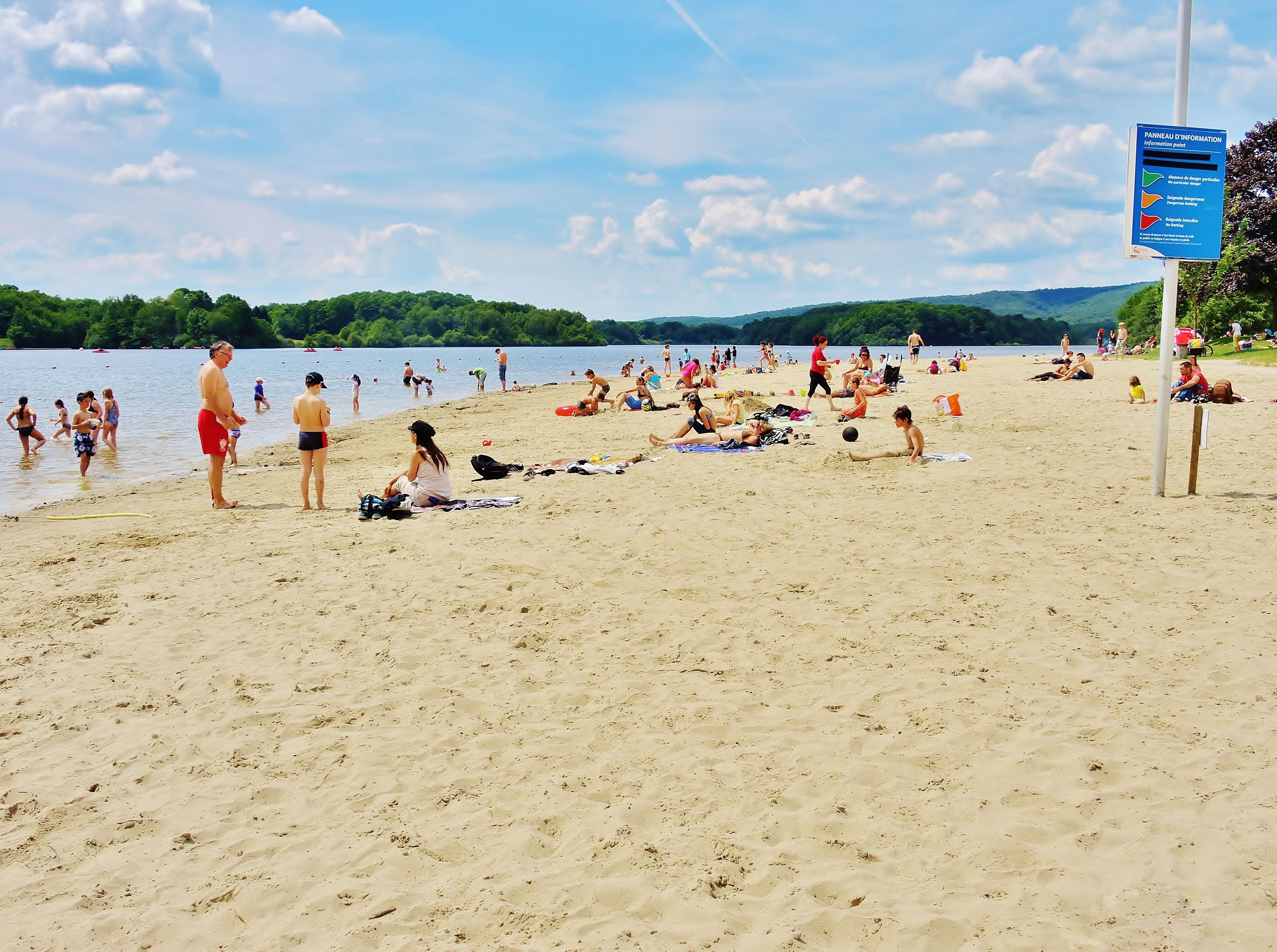 Plage du lac du Malsaucy, au mois de juin. Evette-Salbert. Territoire de Belfort